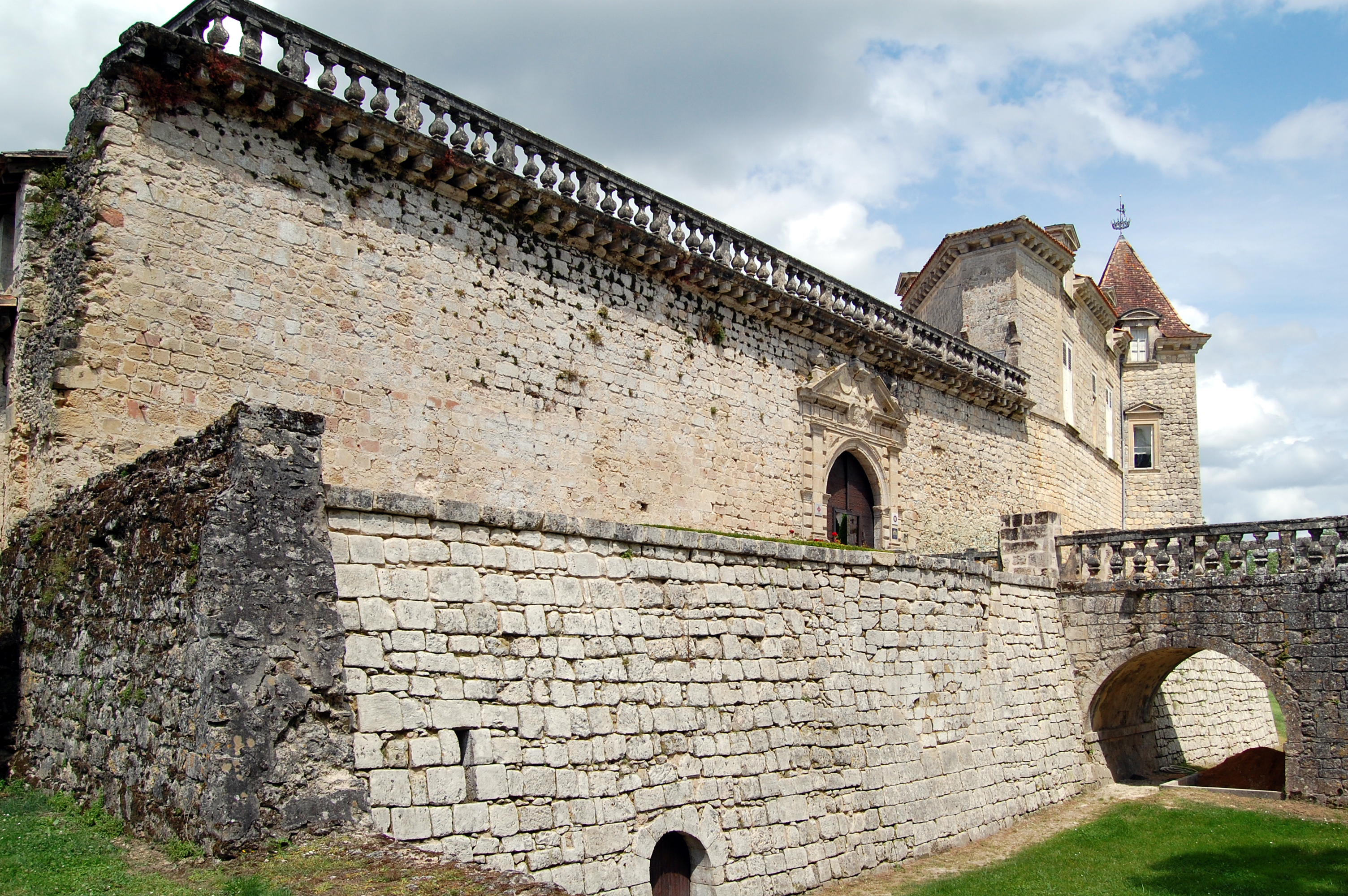 Château de Cazeneuve (17ème siècle), Gironde, France. .